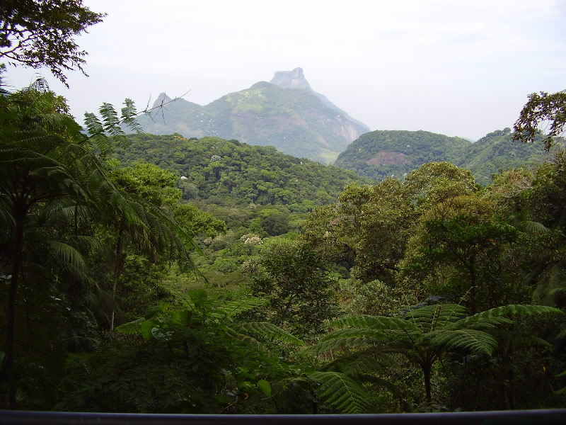 Flora exuberante do Mata Atlântica — do Parque Nacional da Tijuca, Rio de Janeiro, Brasil.